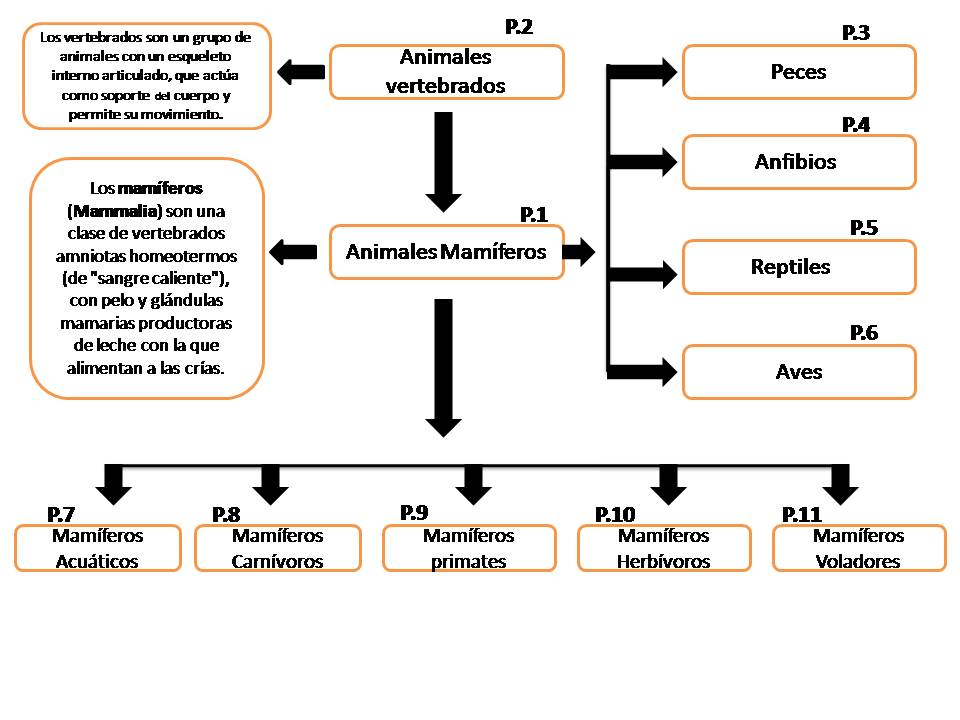 Mentefacto de Mamíferos- Proyecto CteachC